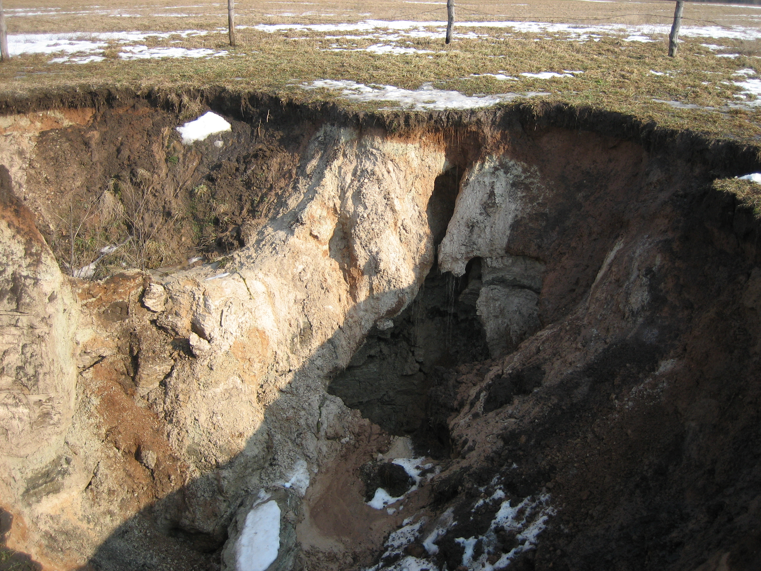 Geologų duobė - gamtos paminklas, karstinė smegduobė Biržų rajone, Karajimiškio kaime